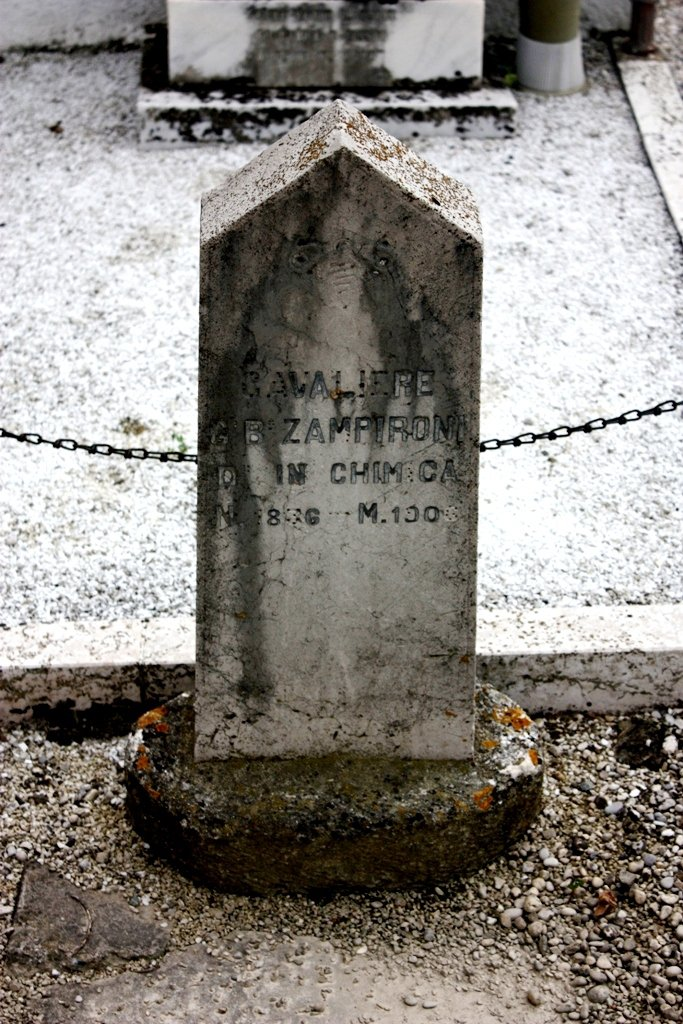 Lapide della sepoltura di Giovanni Battista Zampironi